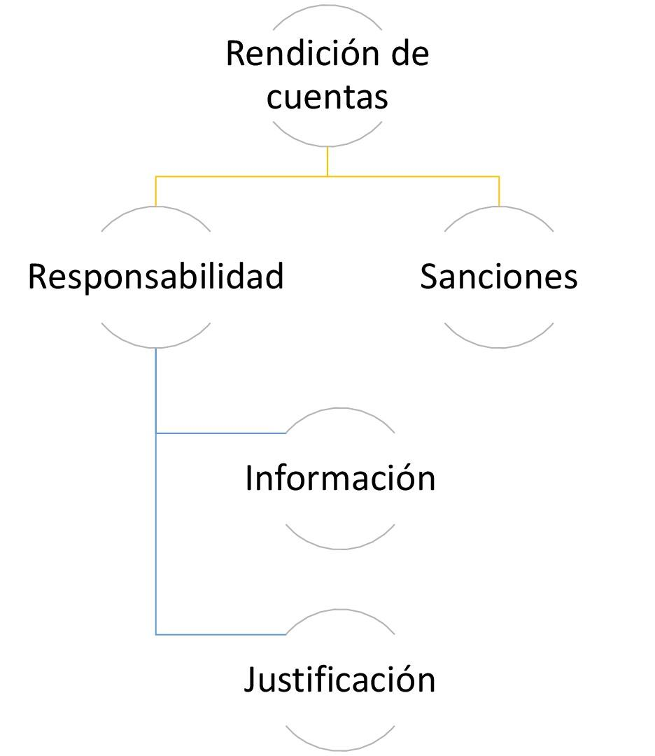 Esquema de Schedler rendicion de cuentas